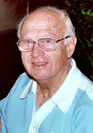 Zeichentrickfilmer Walter Lantz, Aufnahme von 1983; Ausschnitt von Bild:Walter Lantz (1983).jpg, um mögliches Copyright-Problem der dargestellten Cartoonfiguren zu umgehen